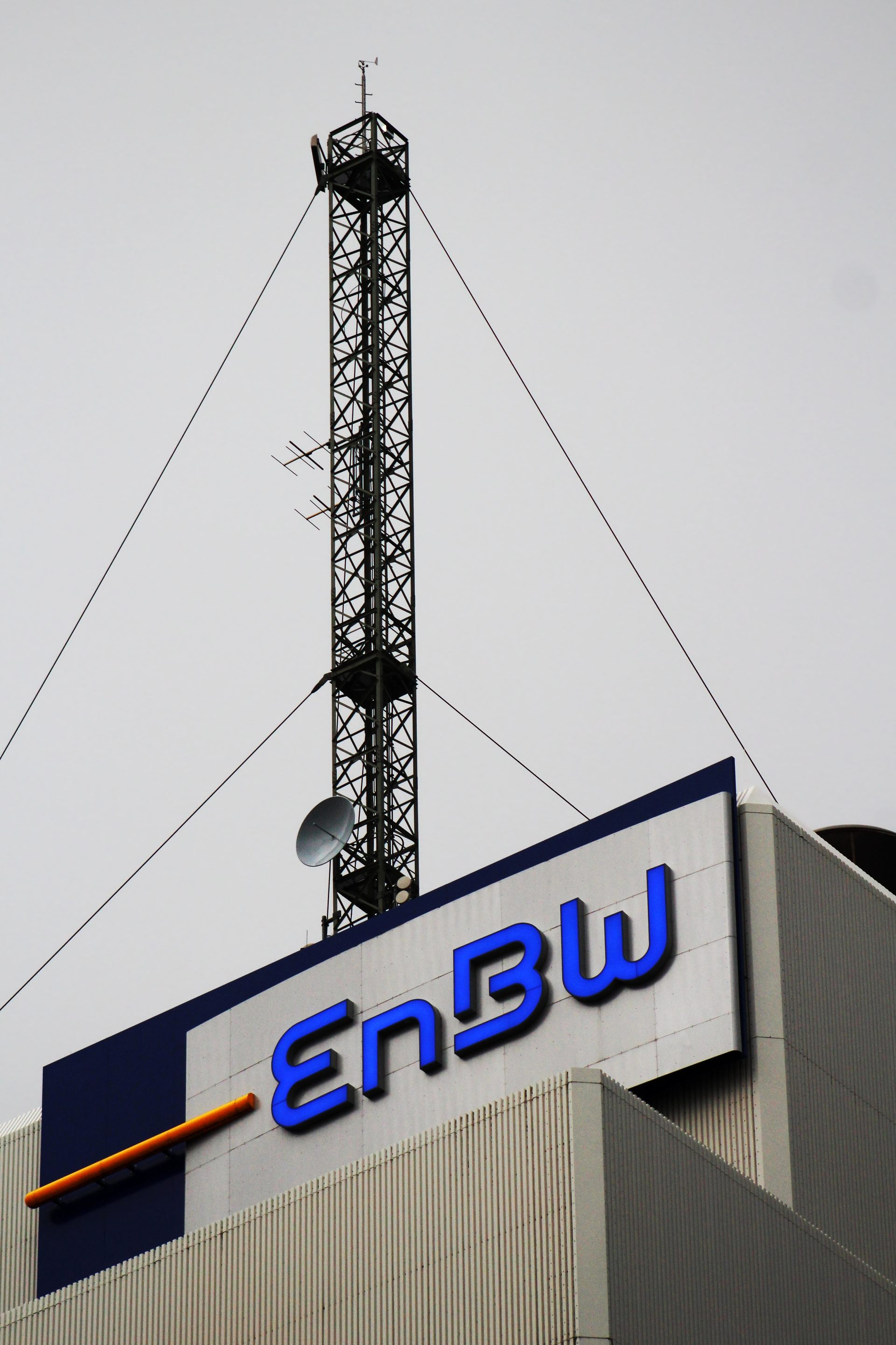 Antennenmast auf dem Dach des Rheinhafen-Dampfkraftwerks Karlsruhe